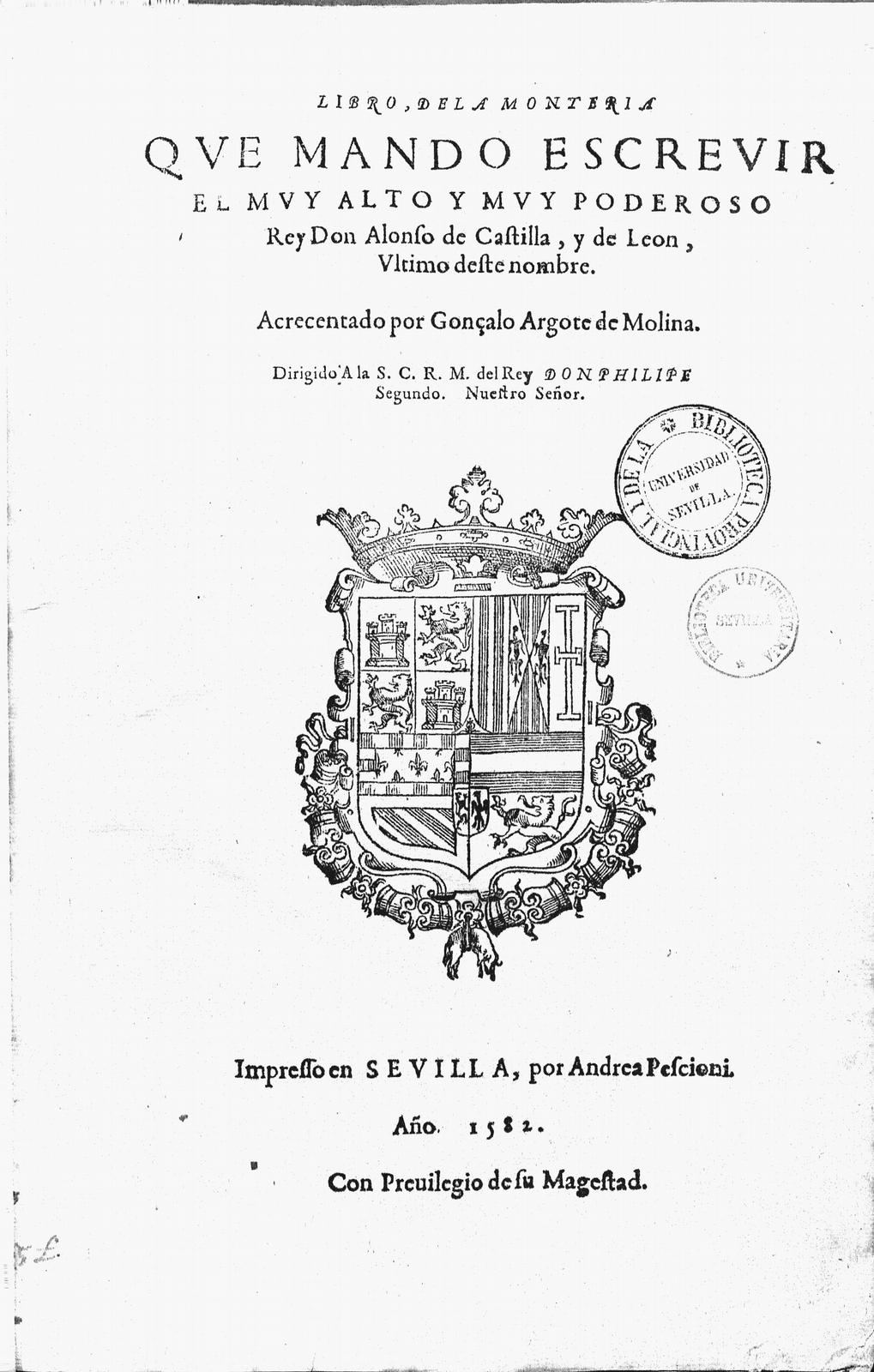 Libro de la monteria